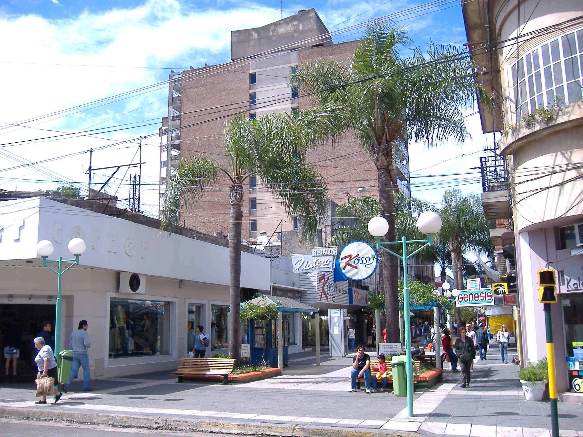 Peatonal Entre Ríos, a 3-block pedestrian segment of Entre Ríos St. in downtown Concordia, Entre Ríos Province, Argentina.